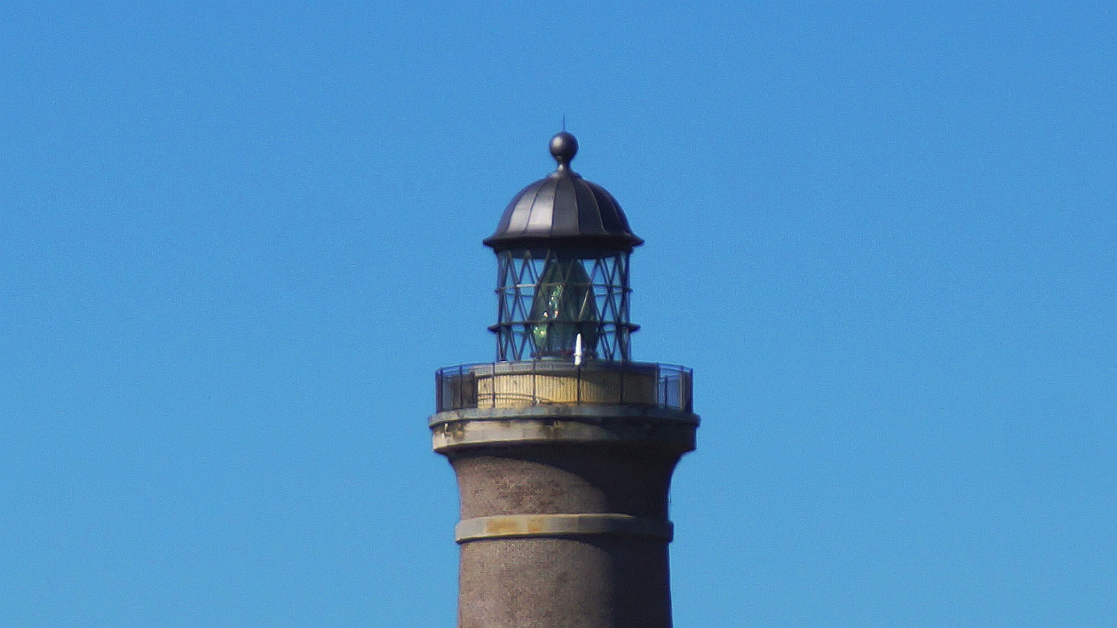 Skagen Fyr Lantarn - Fyrtårn Leuchtturm von 1858 in Nordjylland Danmark. Foto Wolfgang Pehlemann P1220386